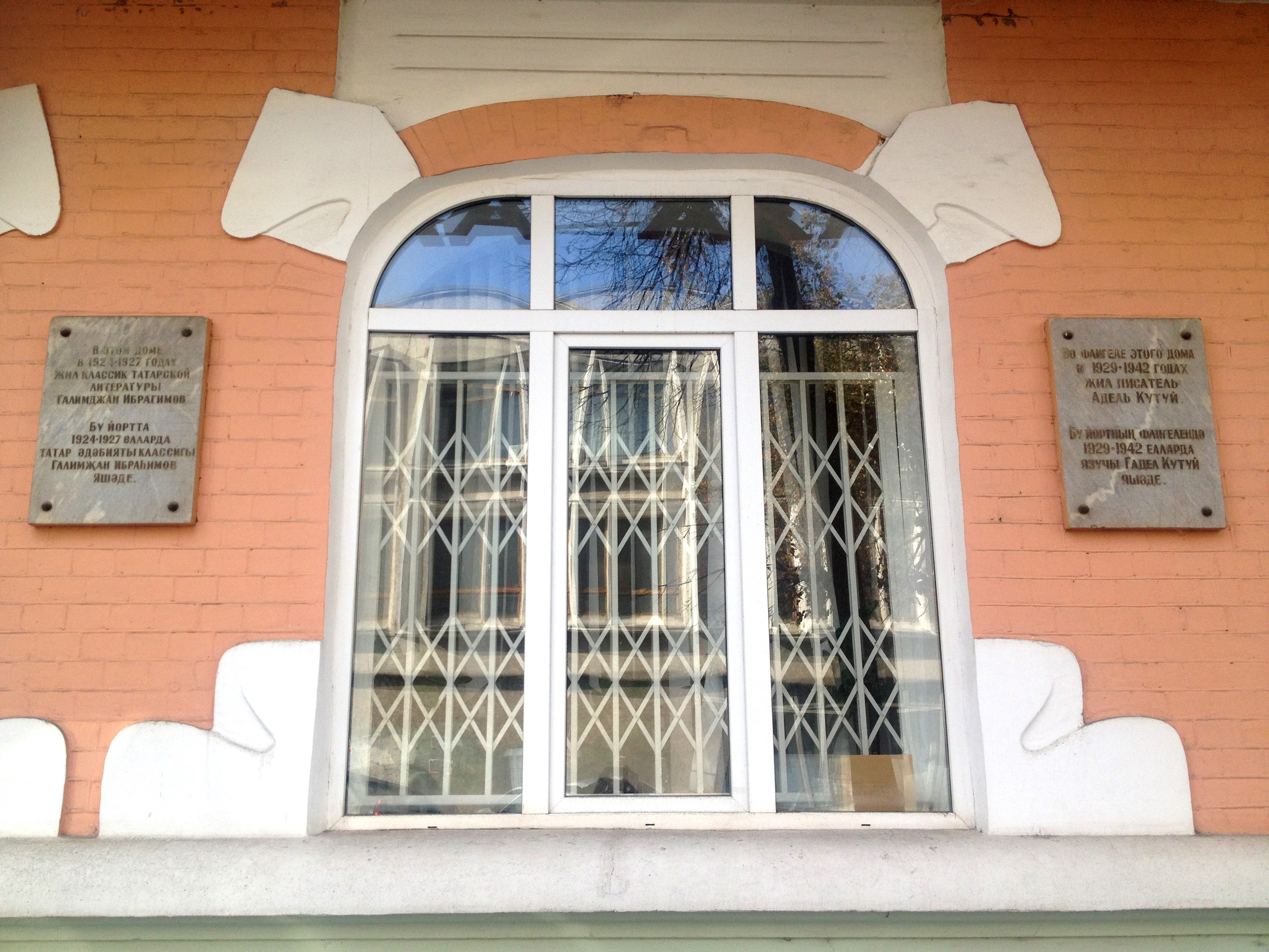 Дом, в котором жил писатель Галимжан Ибрагимов: улица Комлева, 33, Казань, Татарстан